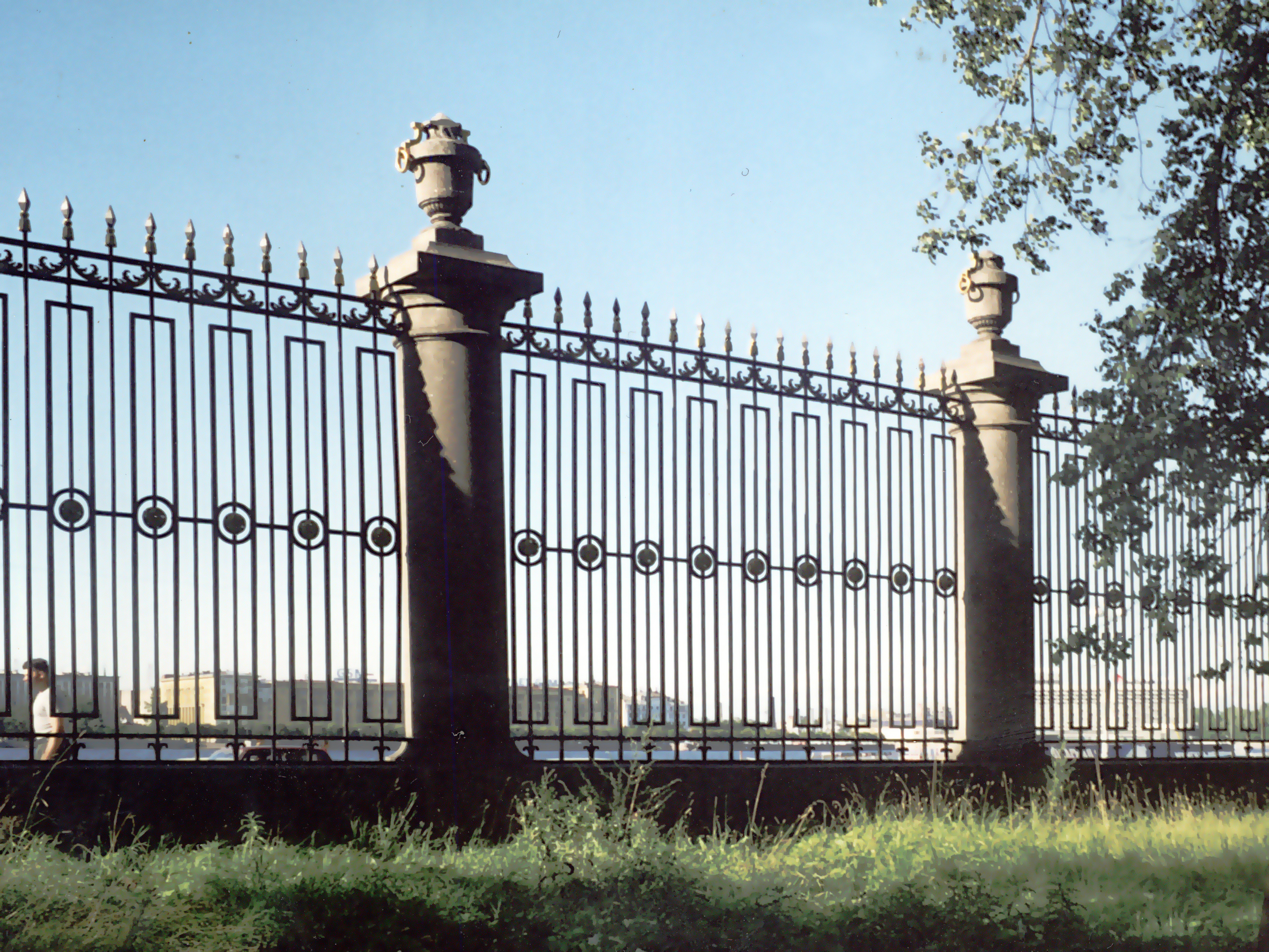 Фельтен Юрий Матвеевич(1730 -1801)и Егоров П.Е. ,(Summer_garten_fence (SPb)(1771 -1884)